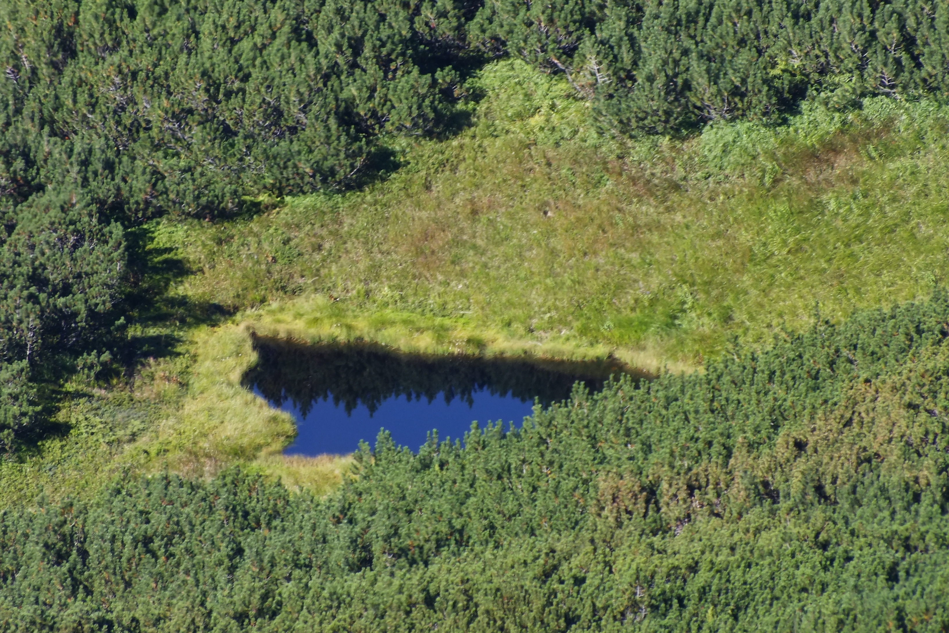 Озерце Бутинець розмістилось на невеликій галявині вільній від чагарників. Берега водойми з усіх сторін порослі осокою.